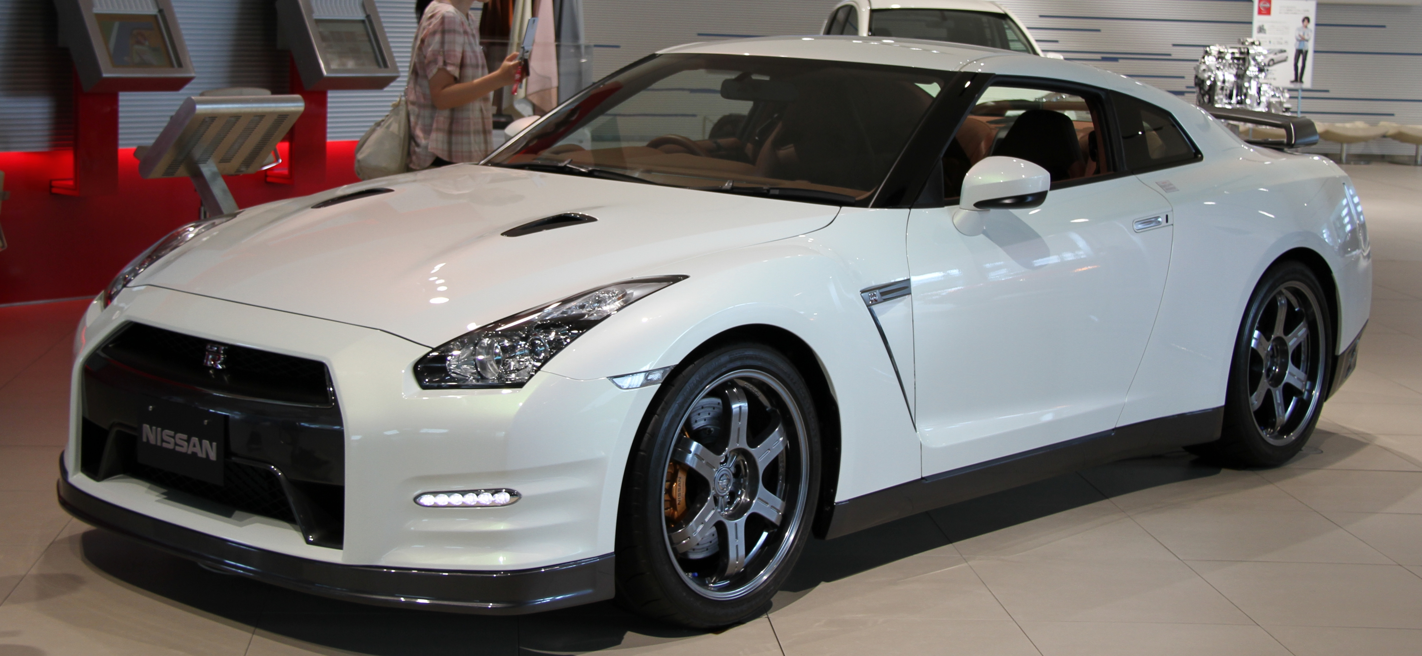 Nissan GT-R